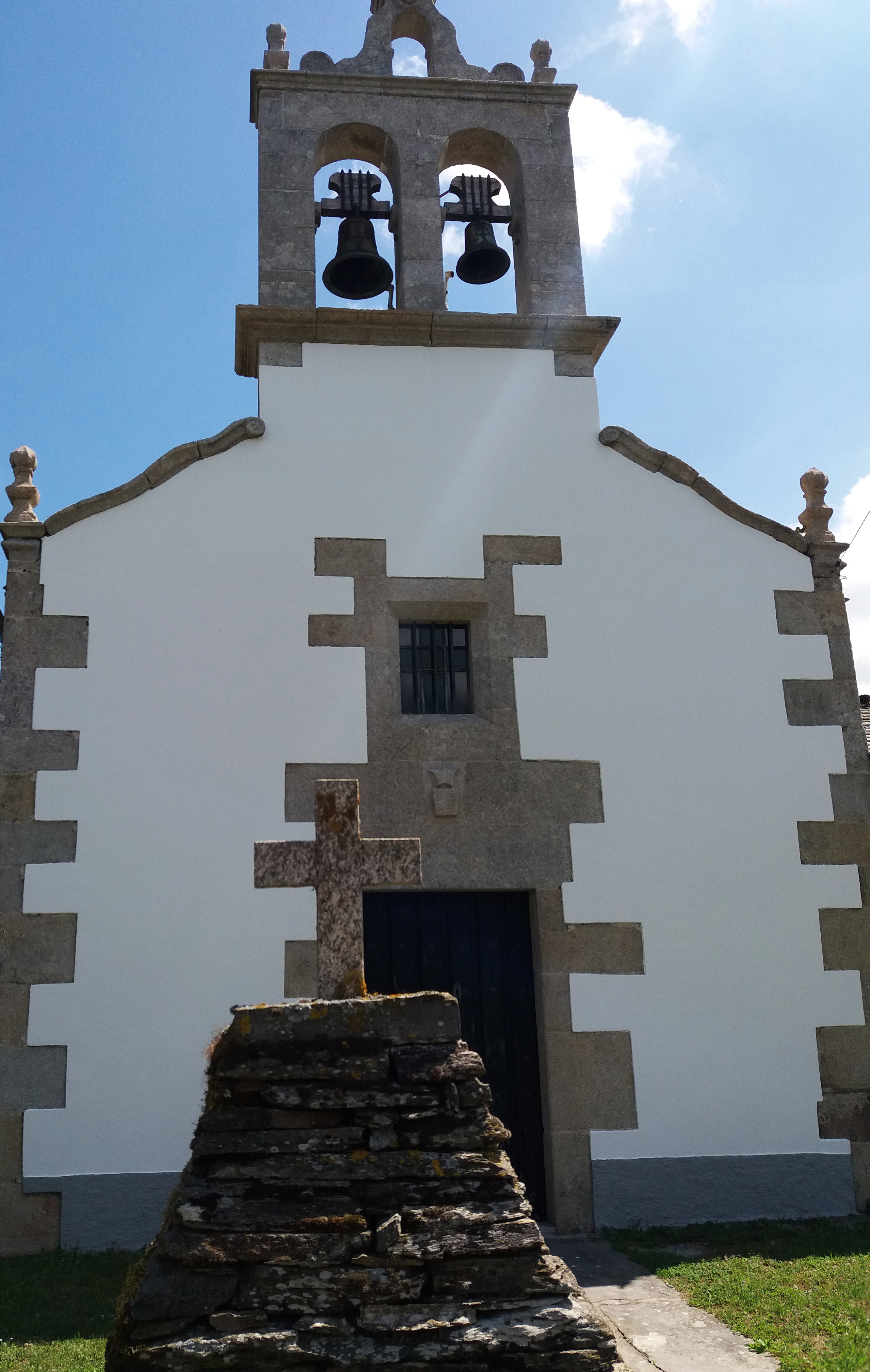 Cruceiro e igrexa na parroquia de Arcillá, no concello de Cospeito (Lugo)